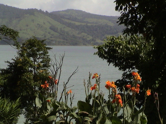 Lake Arenal, Costa Rica